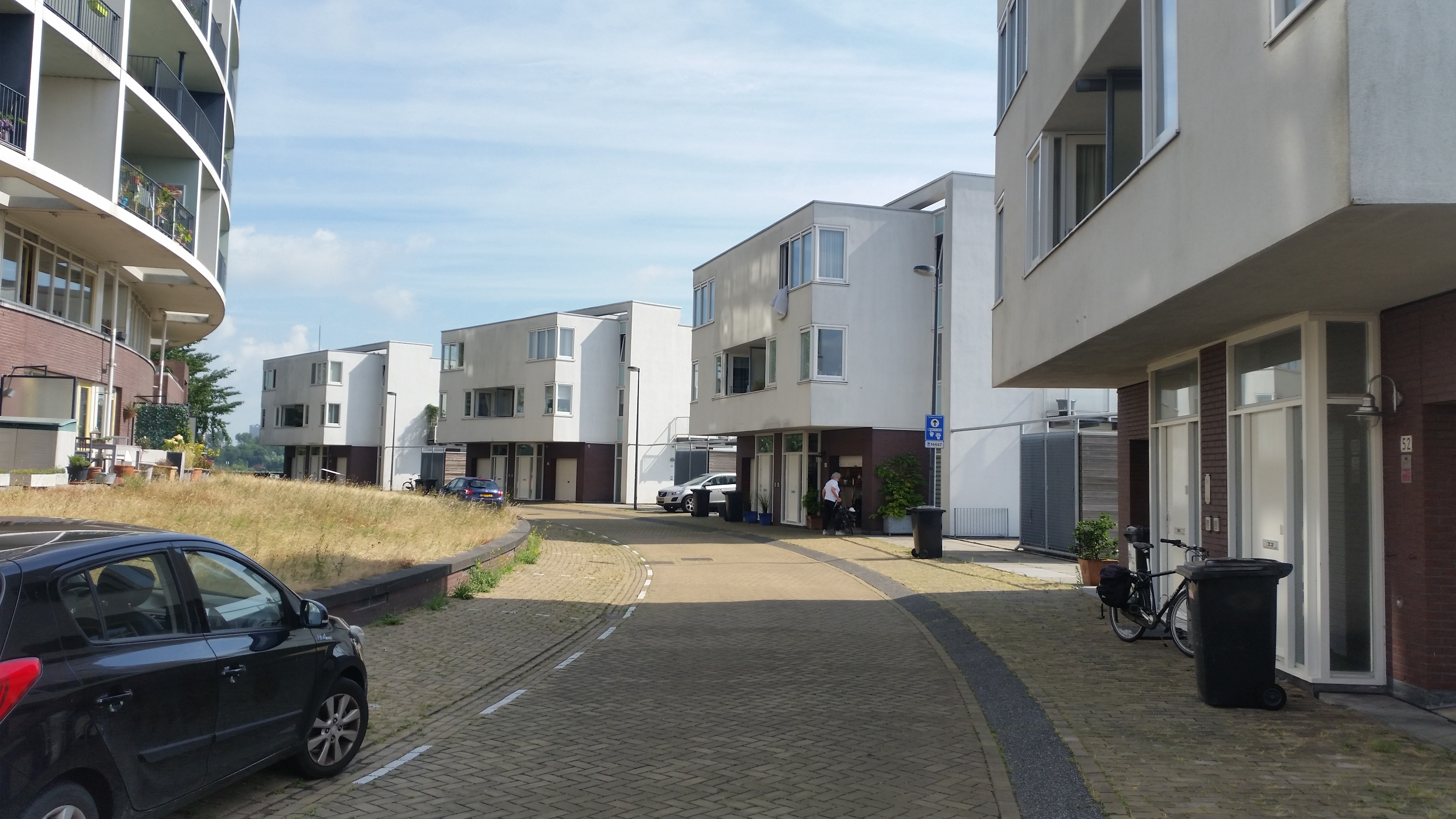 Villa's rondom Emerald Empire